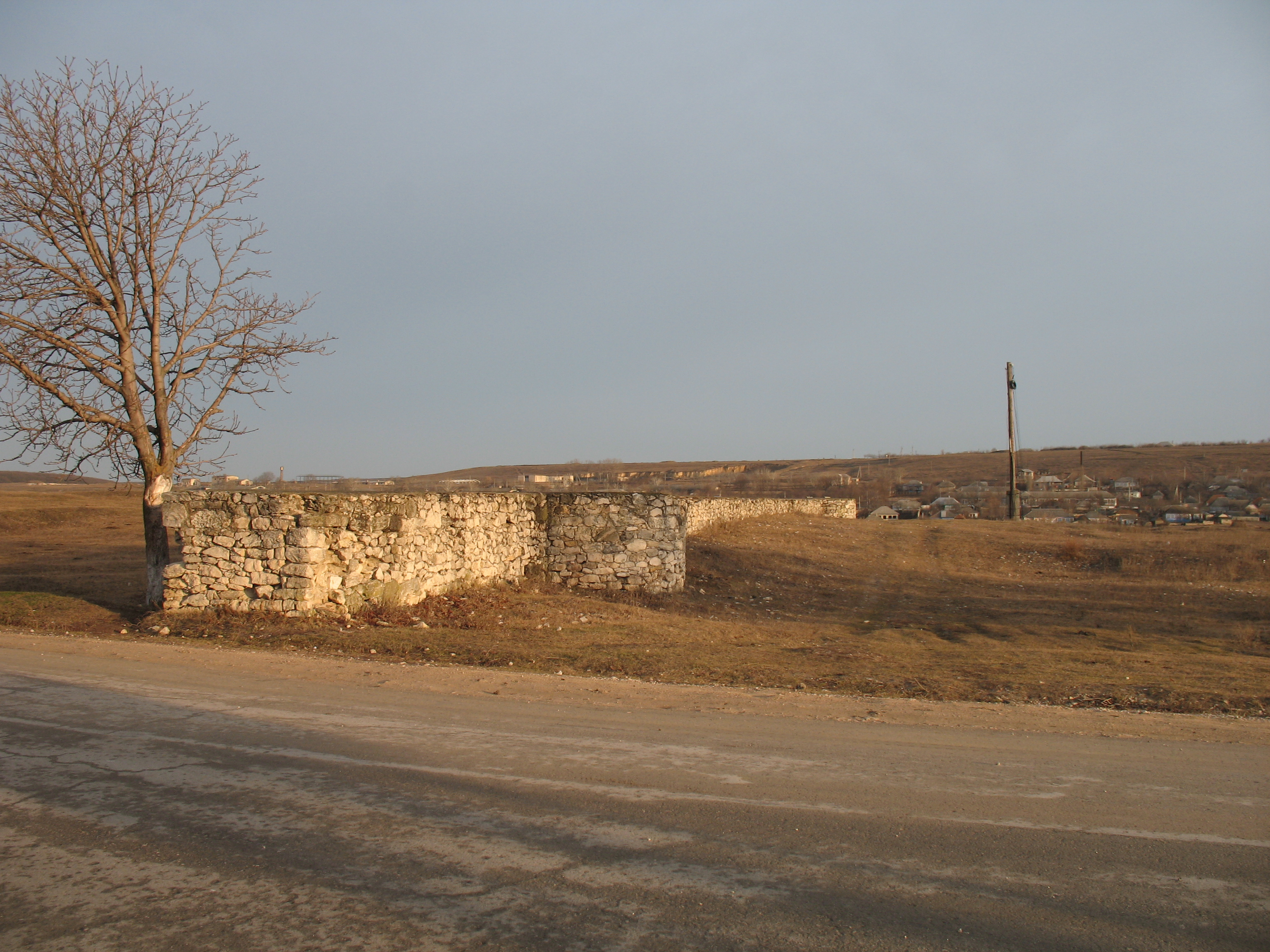 Остатки дворца пэркалаба в Старом Орхее, Оргеевский район, Молдова